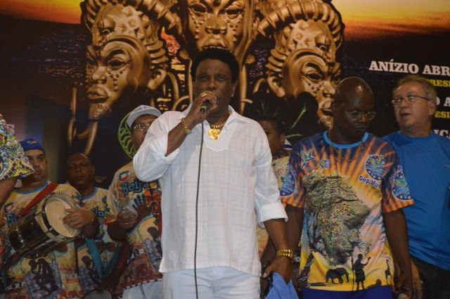 Neguinho da Beija-Flor em 2014